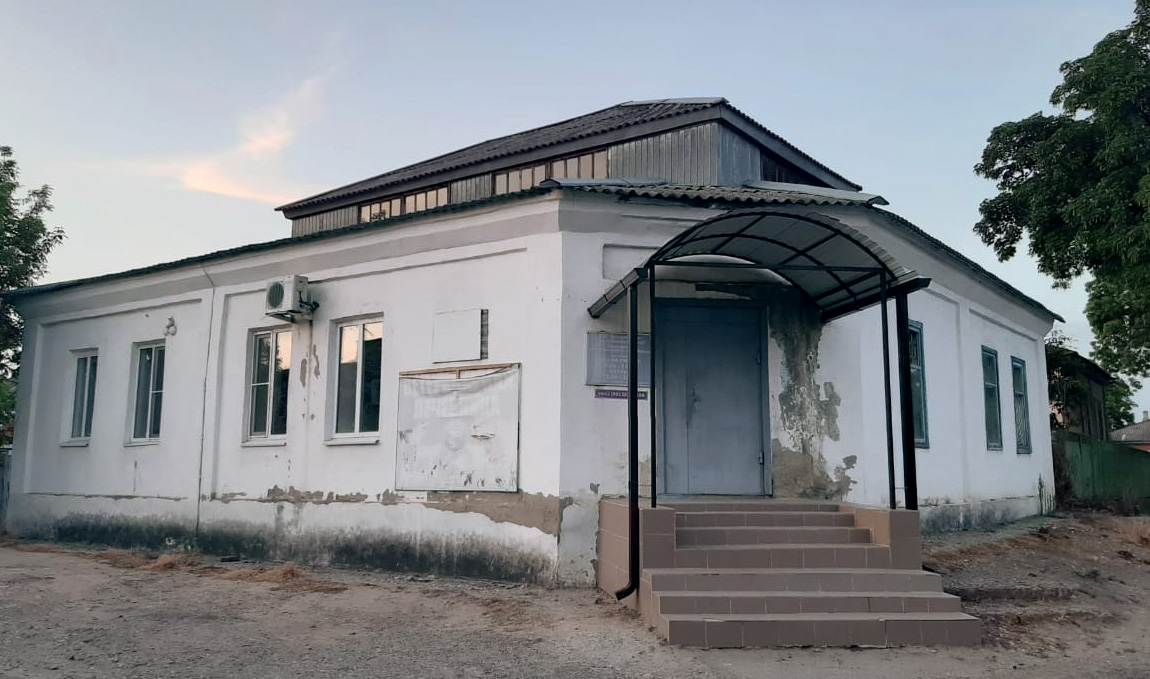 Бывшая лавка Демьяненко в станице Ладожской